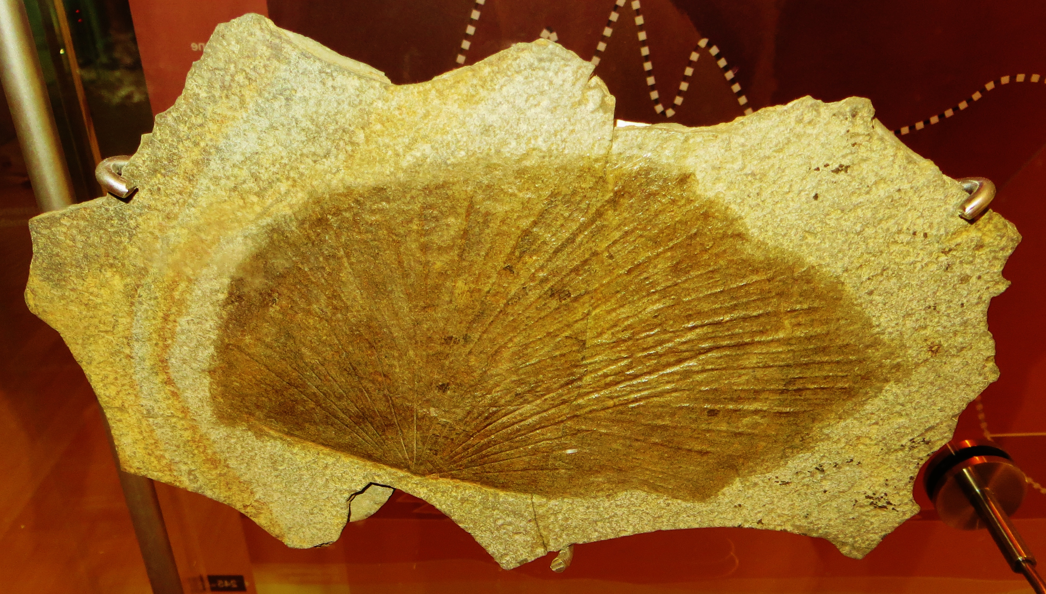 Fossil of Daonella, an extinct mollusc- Took the picture at Muse (Trento)